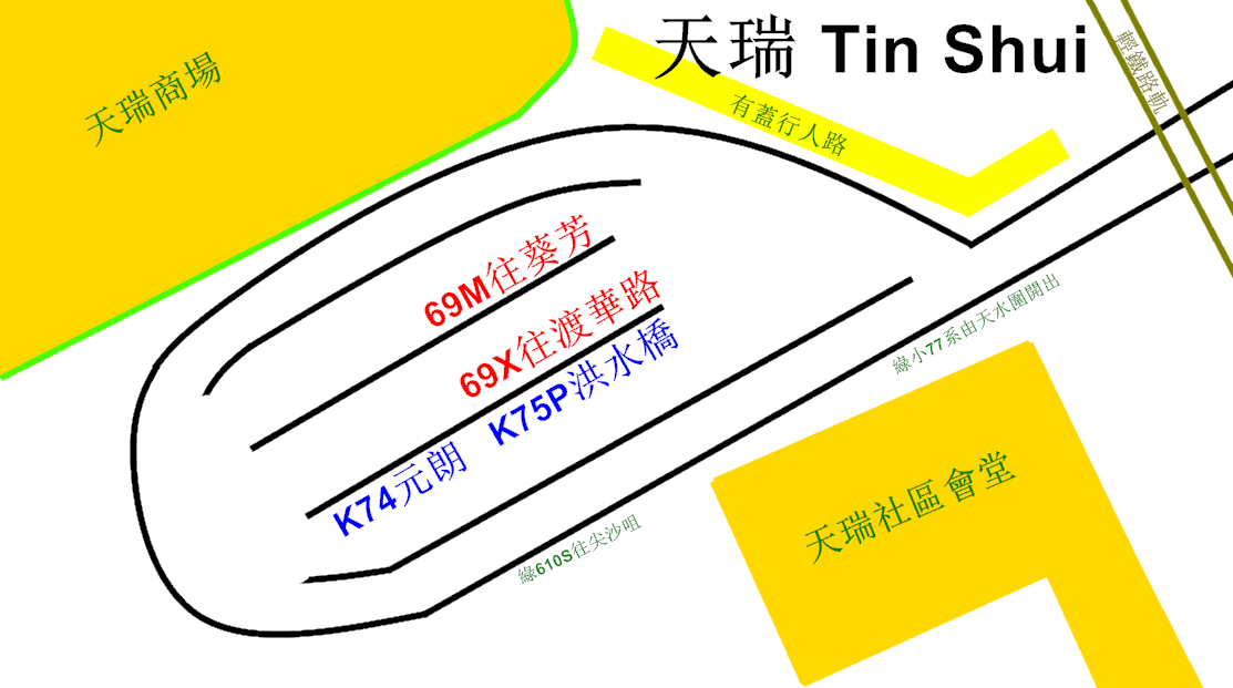 中文（香港）: 天水圍的天瑞巴士總站的平面圖